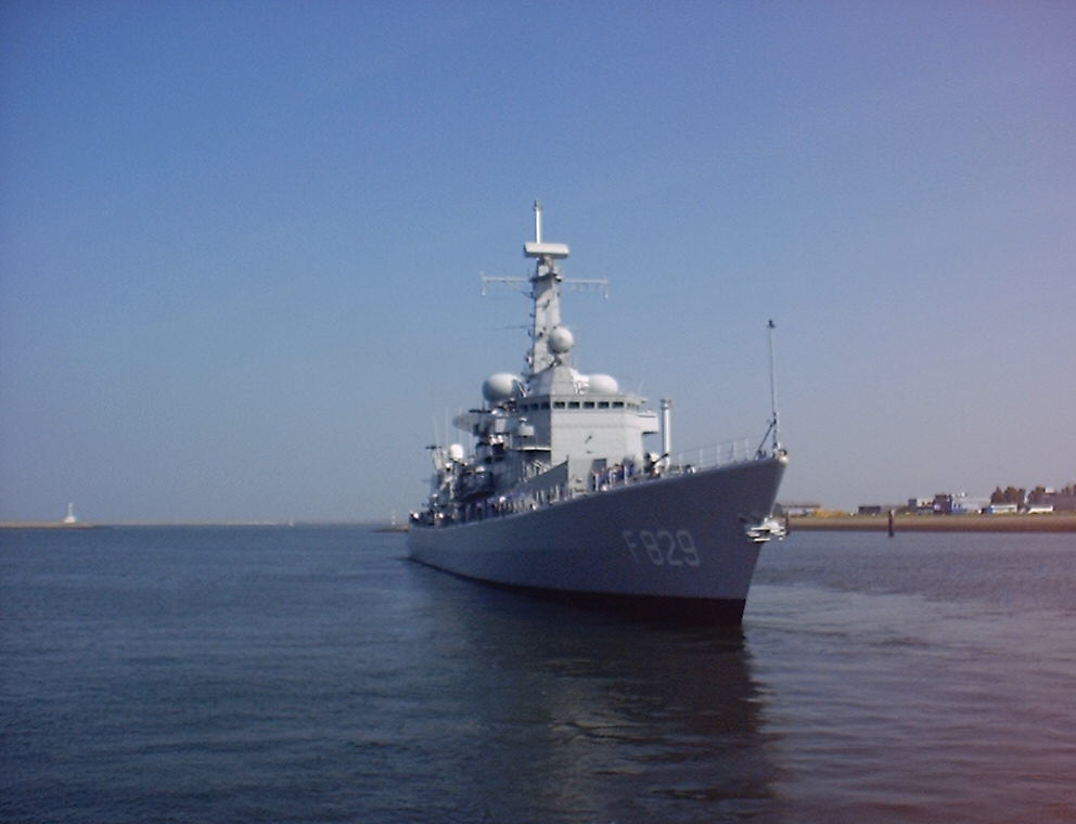 Frigate dutch navy